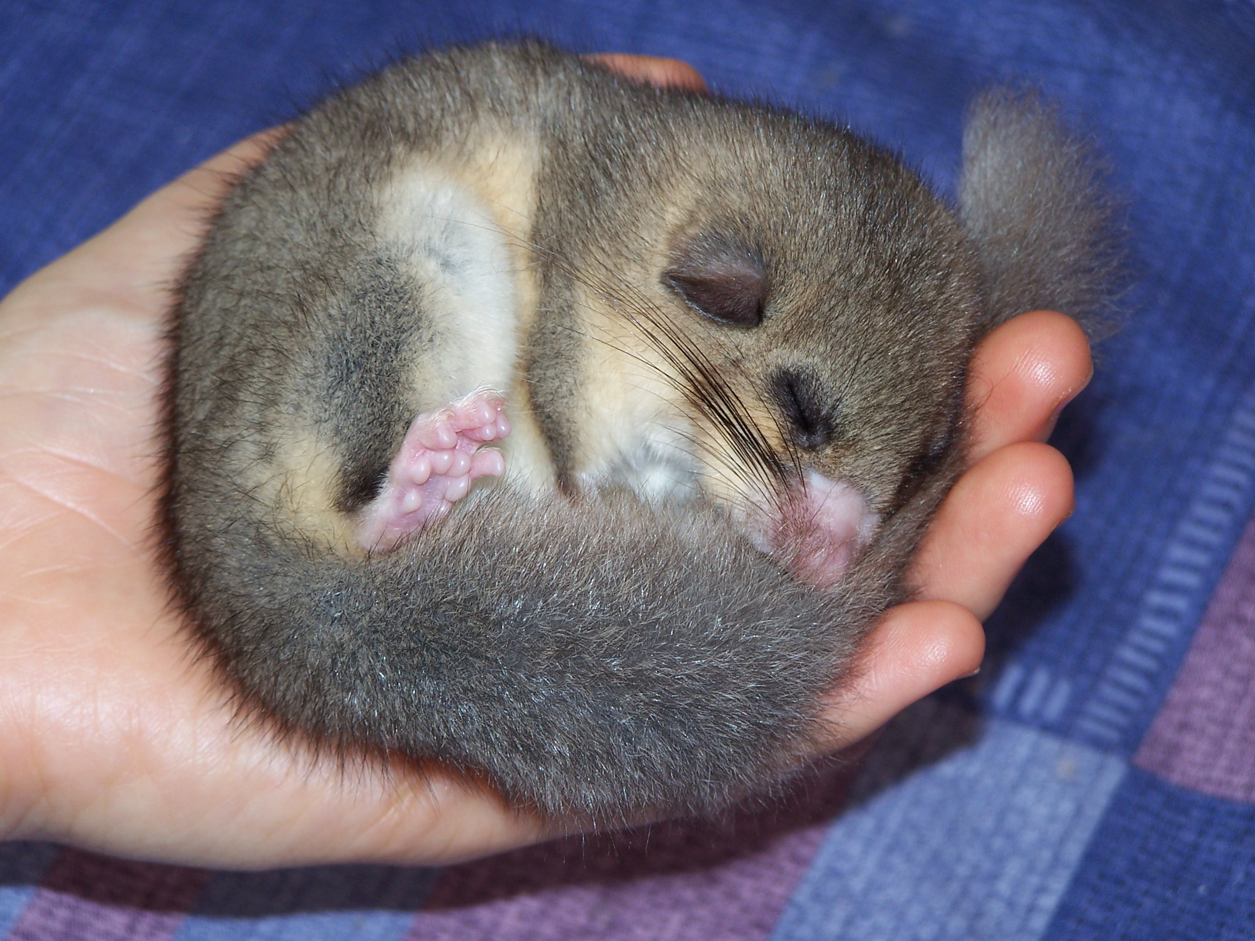 Téli álmot alvó nagy pele